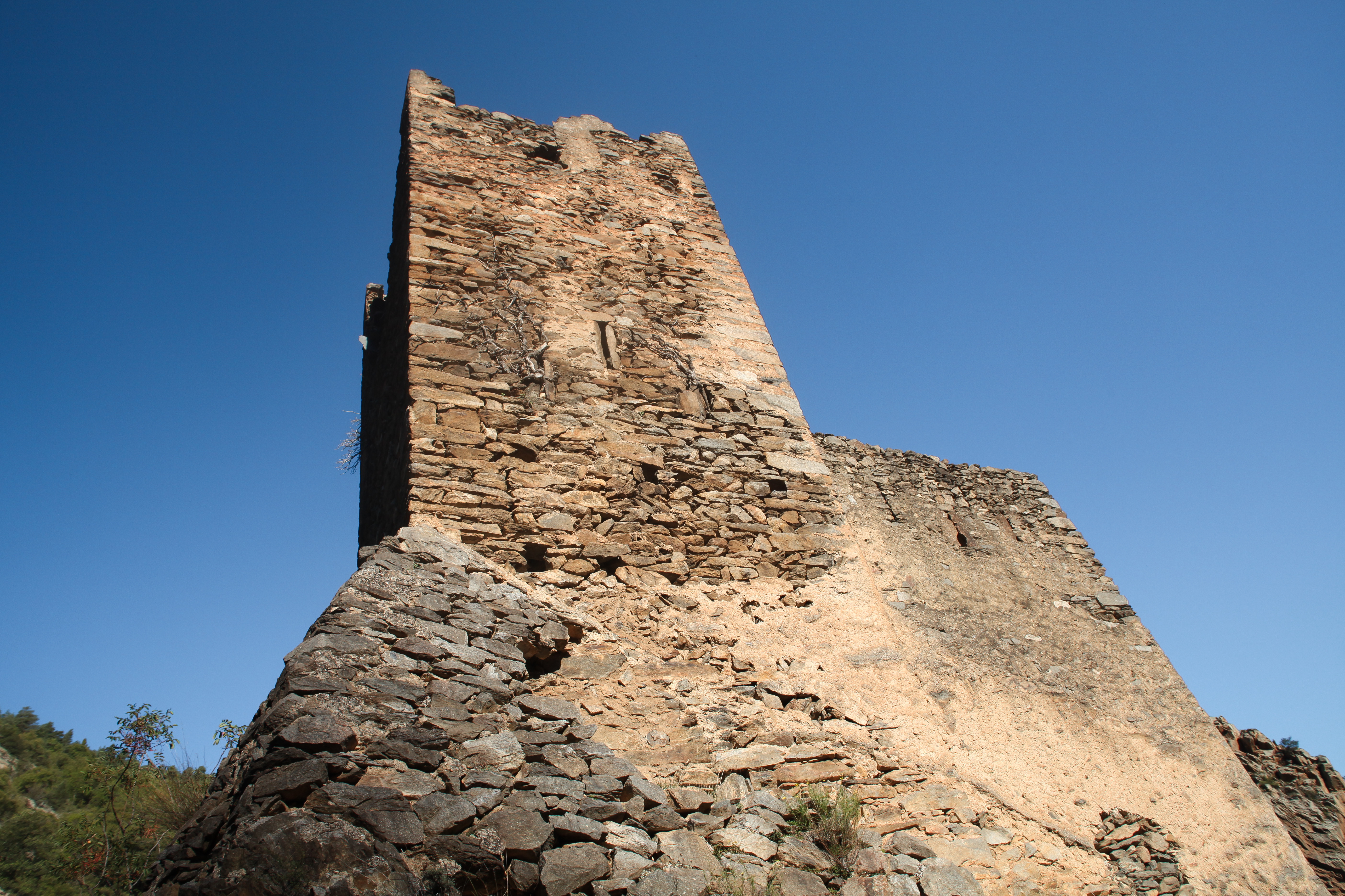 Château de la Roca d'Anyer, vestiges du Xème siècle .